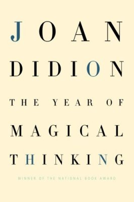 Joan Didion The Year of Magical Thinking 2005 Title